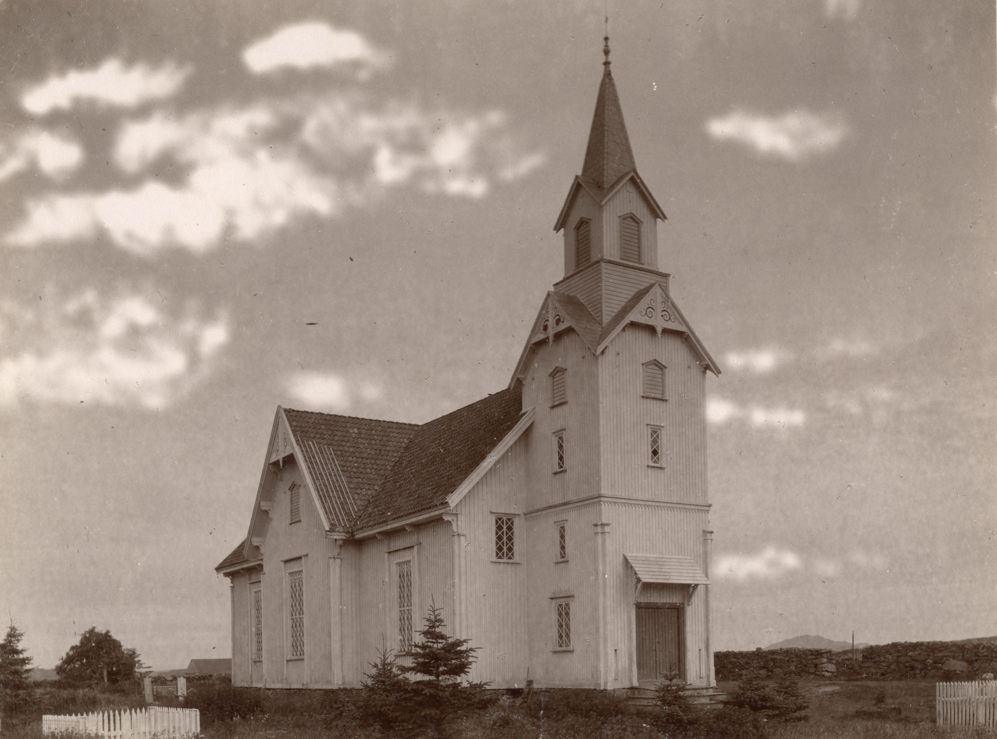 Kopervik kirke i Kopervik, Rogaland Brant ned 28. mai 2010.